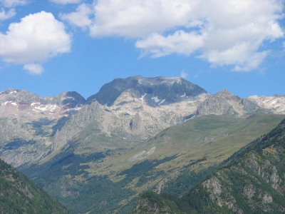 Pico Perdiguero. Cara sur. Esta imagen ha sido tomada personalmente por Avh